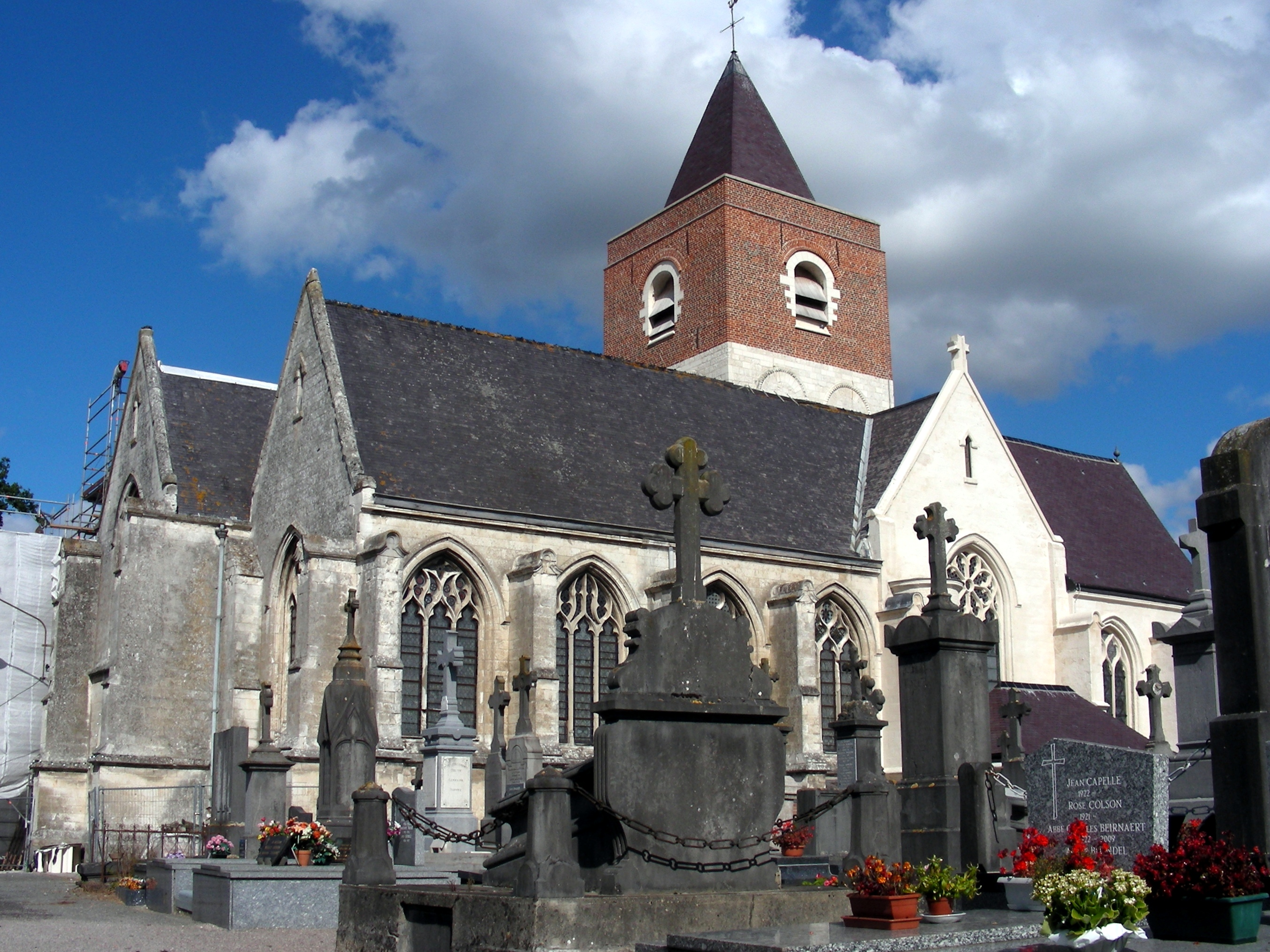 Église Saint-Vincent de Haverskerque